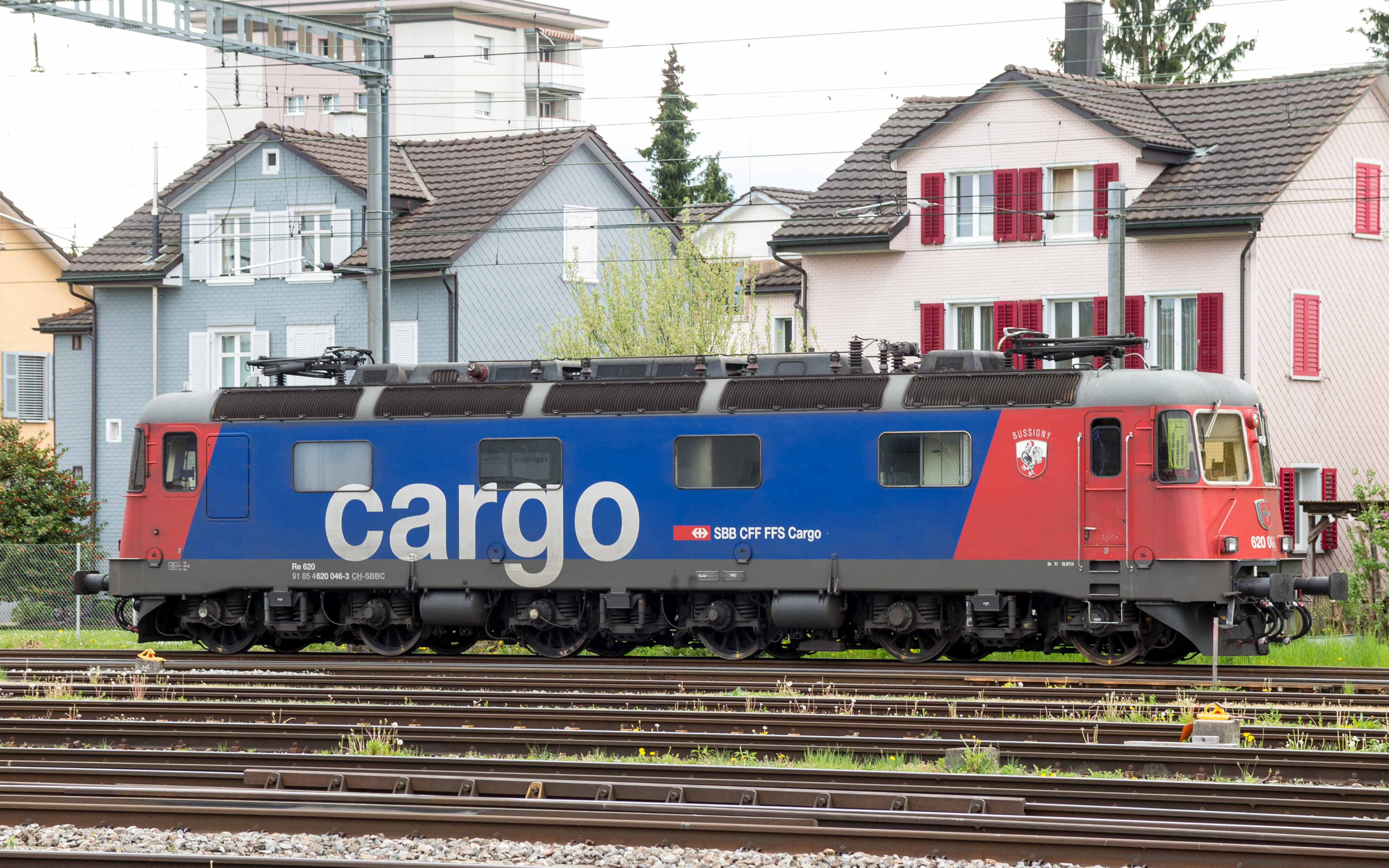 Re 620 046-3 "Bussigny" in den Farben von SBB Cargo in Wil SG